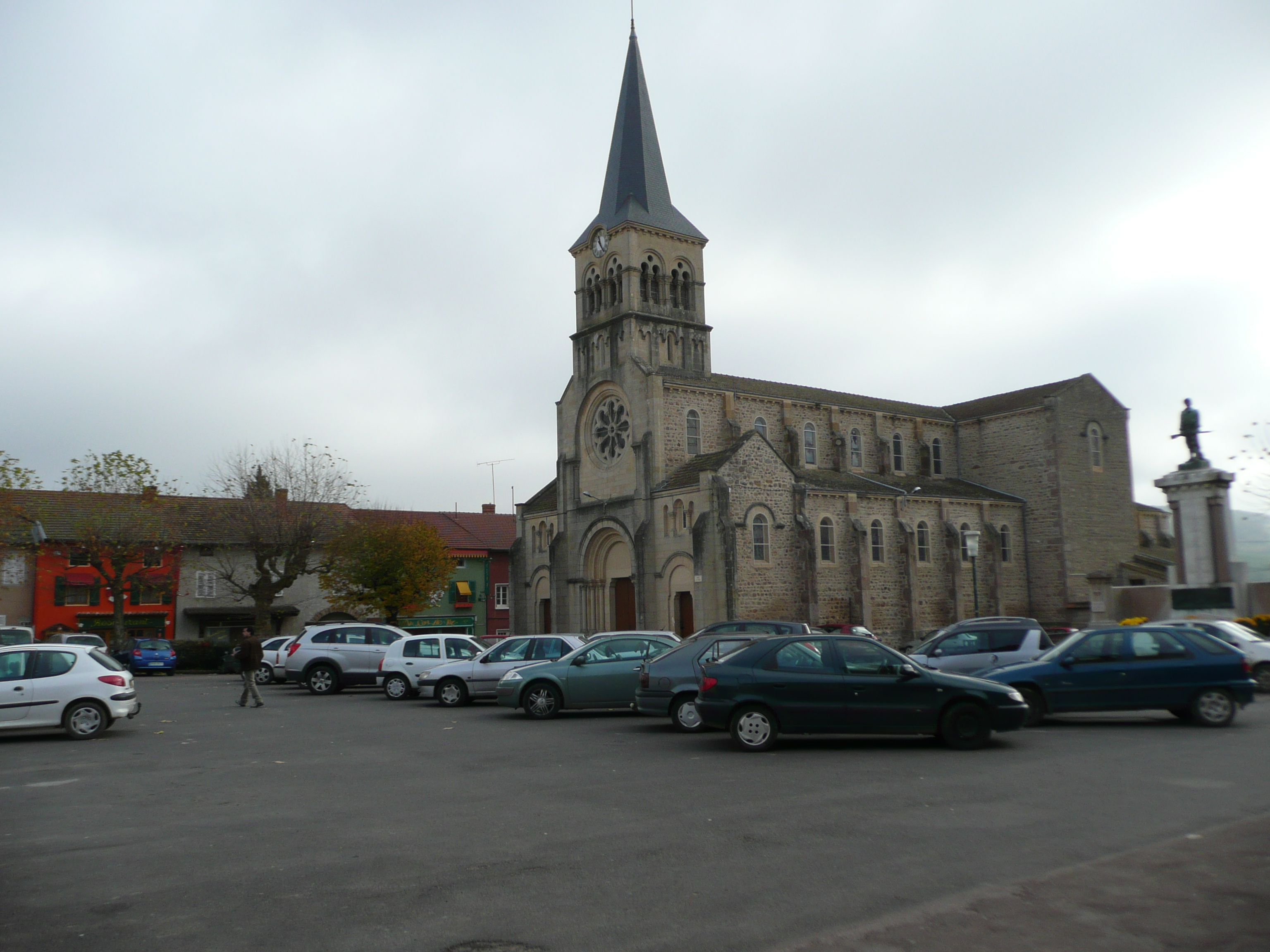 Église de Matour (Saône-et-Loire, France)